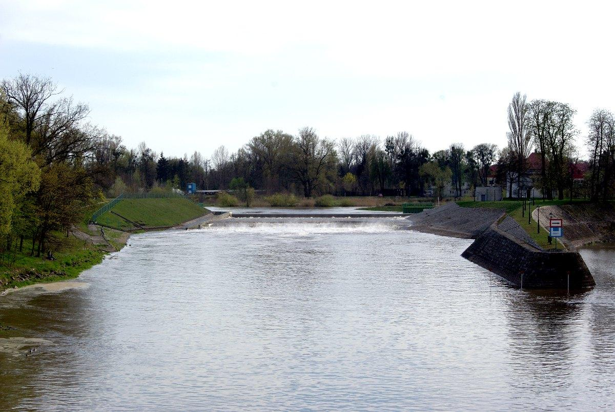 Jaz Szczytniki.